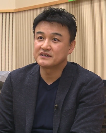 라디오 DJ 데뷔 후 인터뷰를 하는 박중훈.